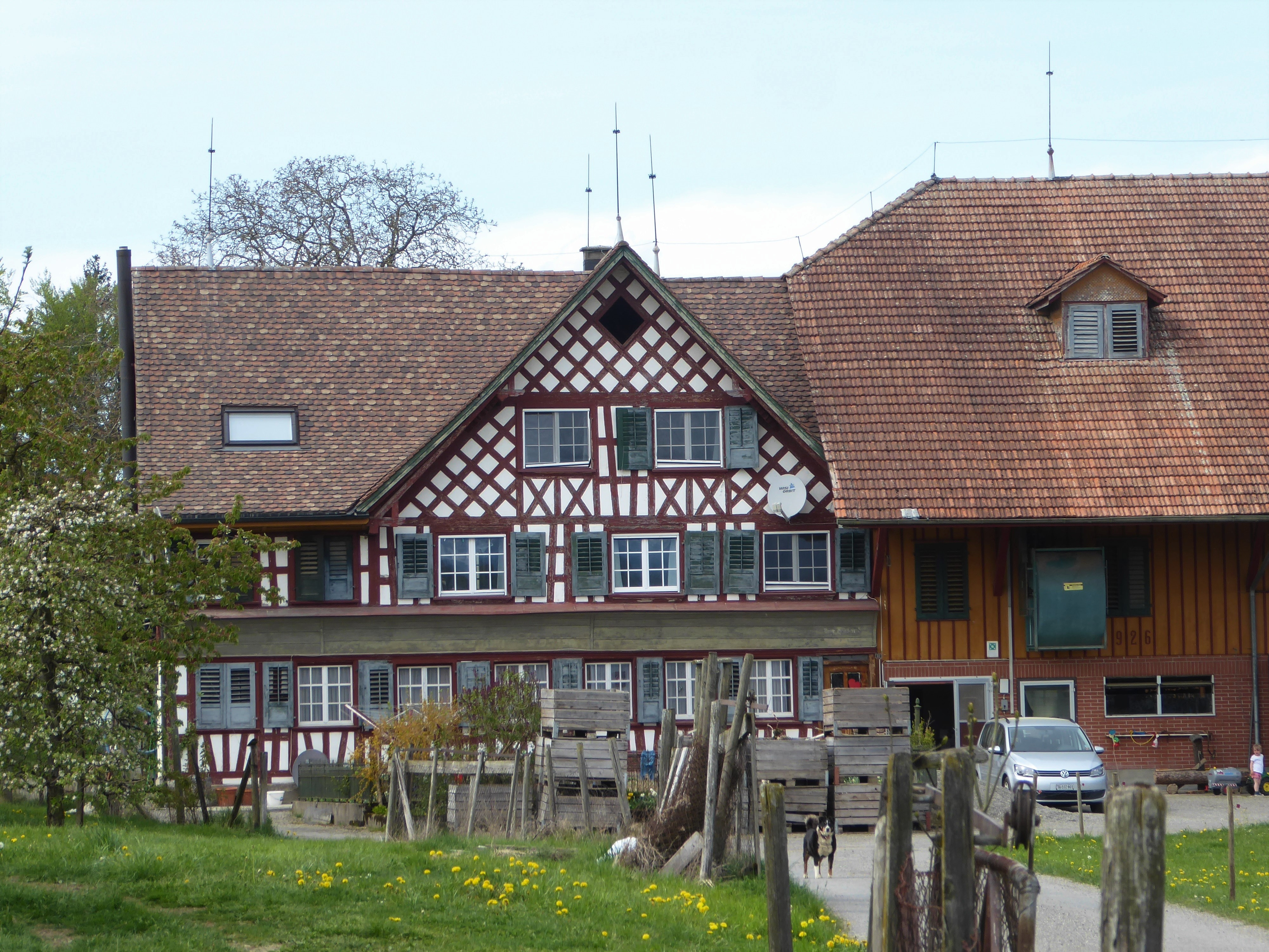 Bauernhaus Schweizerholzstrasse 32 in der Gemeinde Bischofszell